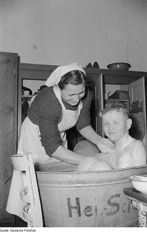 Original image description from the Deutsche Fotothek Junge, der in einem Waschzuber gewaschen wird